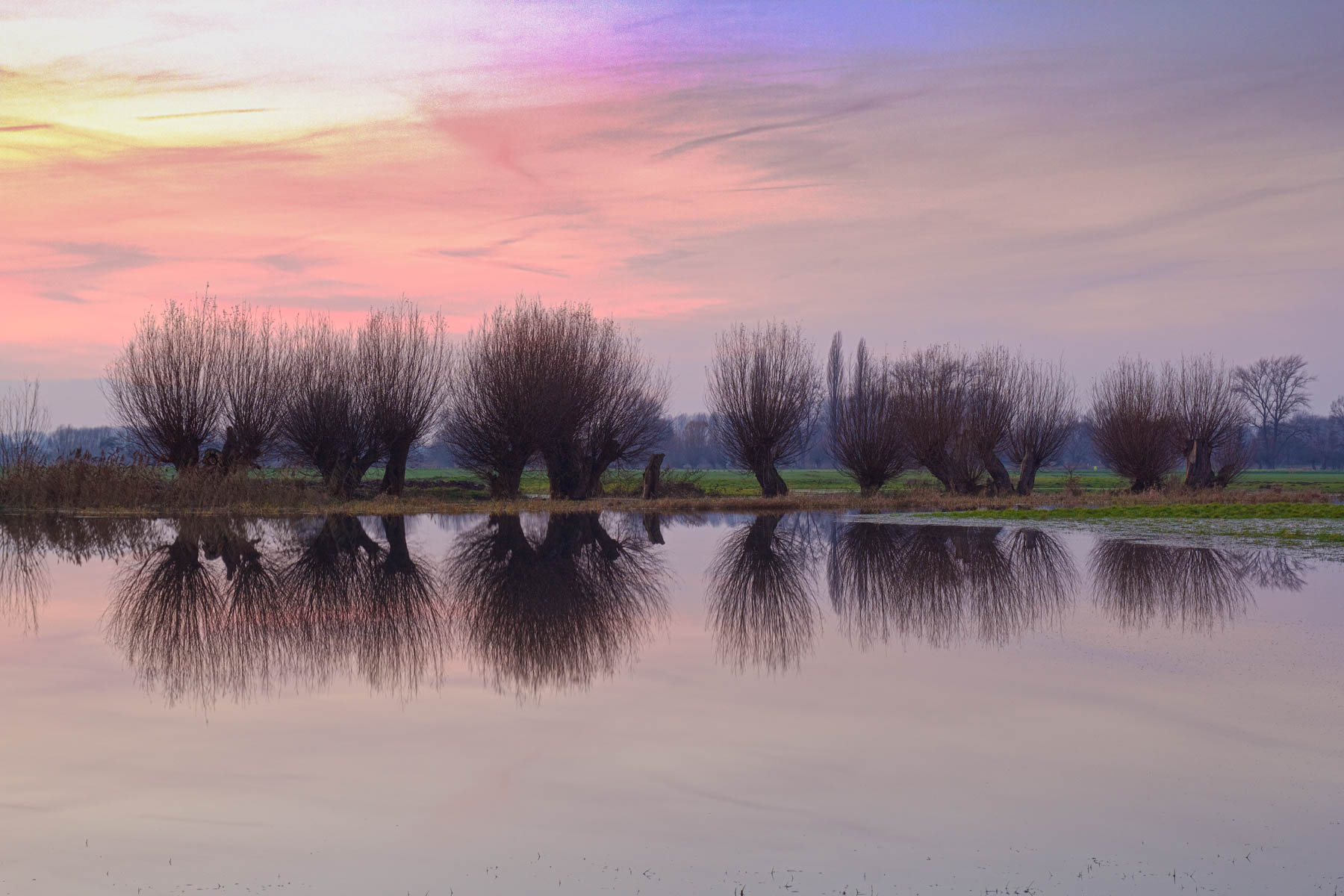 Stieleiche (Quercus robur L.) und Korbweiden (Salix viminalis) an einem überschwemmten Feld in der Südlichen Leineaue bei Hannover